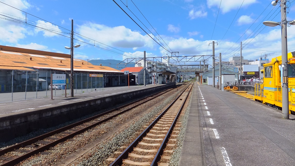 JR四国 予讃線 伊予市駅（2015年7月）